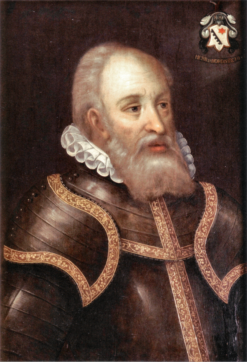 Zeitgenössisches Porträt Gerhard III. von Morriens (ca. 1565-1607), Erbmarschall des Fürstbistums Münster